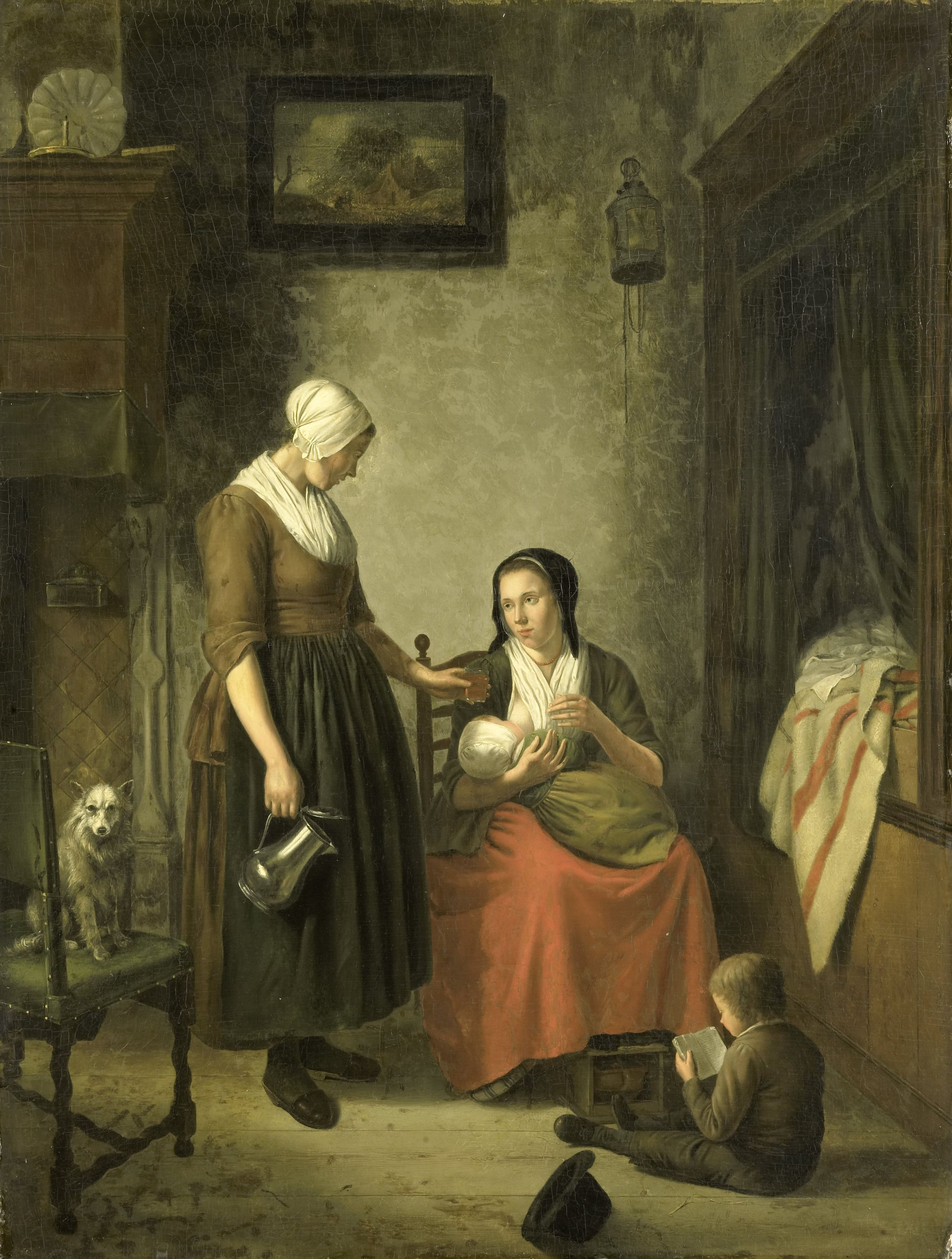 In een interieur geeft een jonge vrouw haar kind de borst. Zij zit op een stoel, de voeten op een stoof, naast de bedstee. Bij haar voeten zit een jongetje op de vloer te lezen in een boekje. De vrouw krijgt van een staande dienstmeid met een tinnen kan met deksel een glas drinken aangereikt. Links zit een hondje op een stoel. Tegen de wand een schilderij met een landschap en een lantaarn.